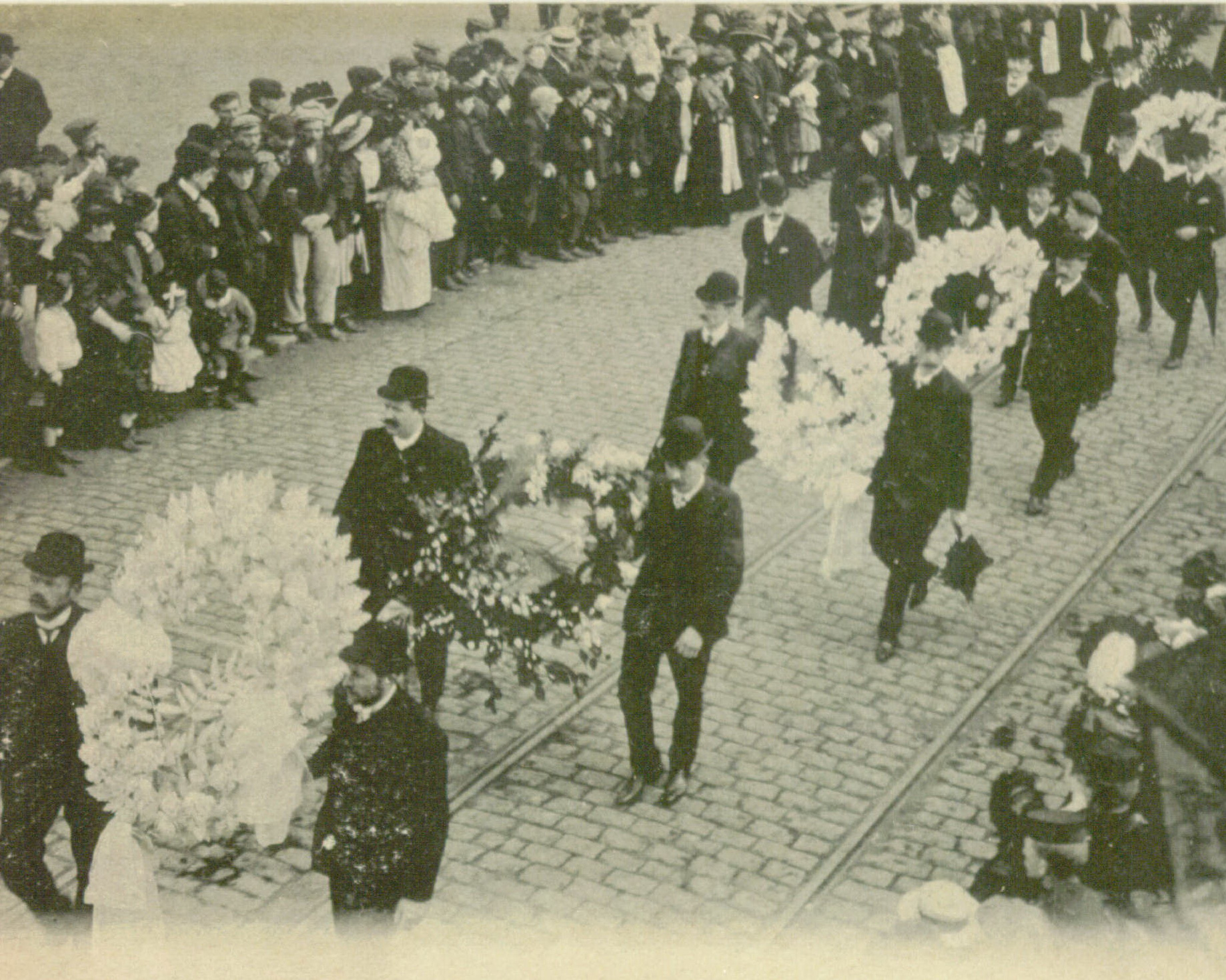 Beerdigung von Karel Verbist